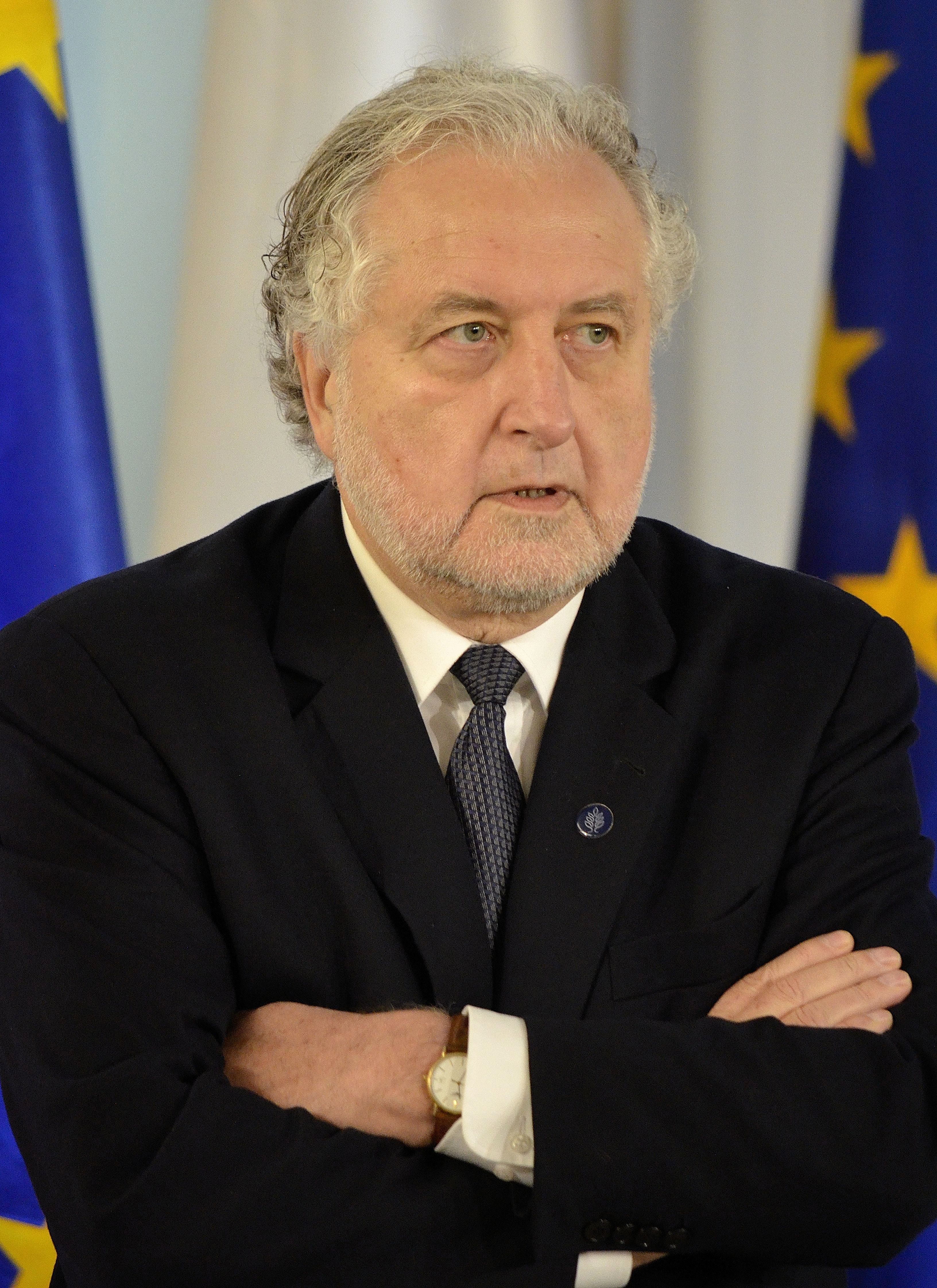 Prezes Trybunału Konstytucyjnego Andrzej Rzepliński podczas uroczystości wręczenia zaświadczeń o wyborze nowo wybranym posłom w Sali Kolumnowej Sejmu